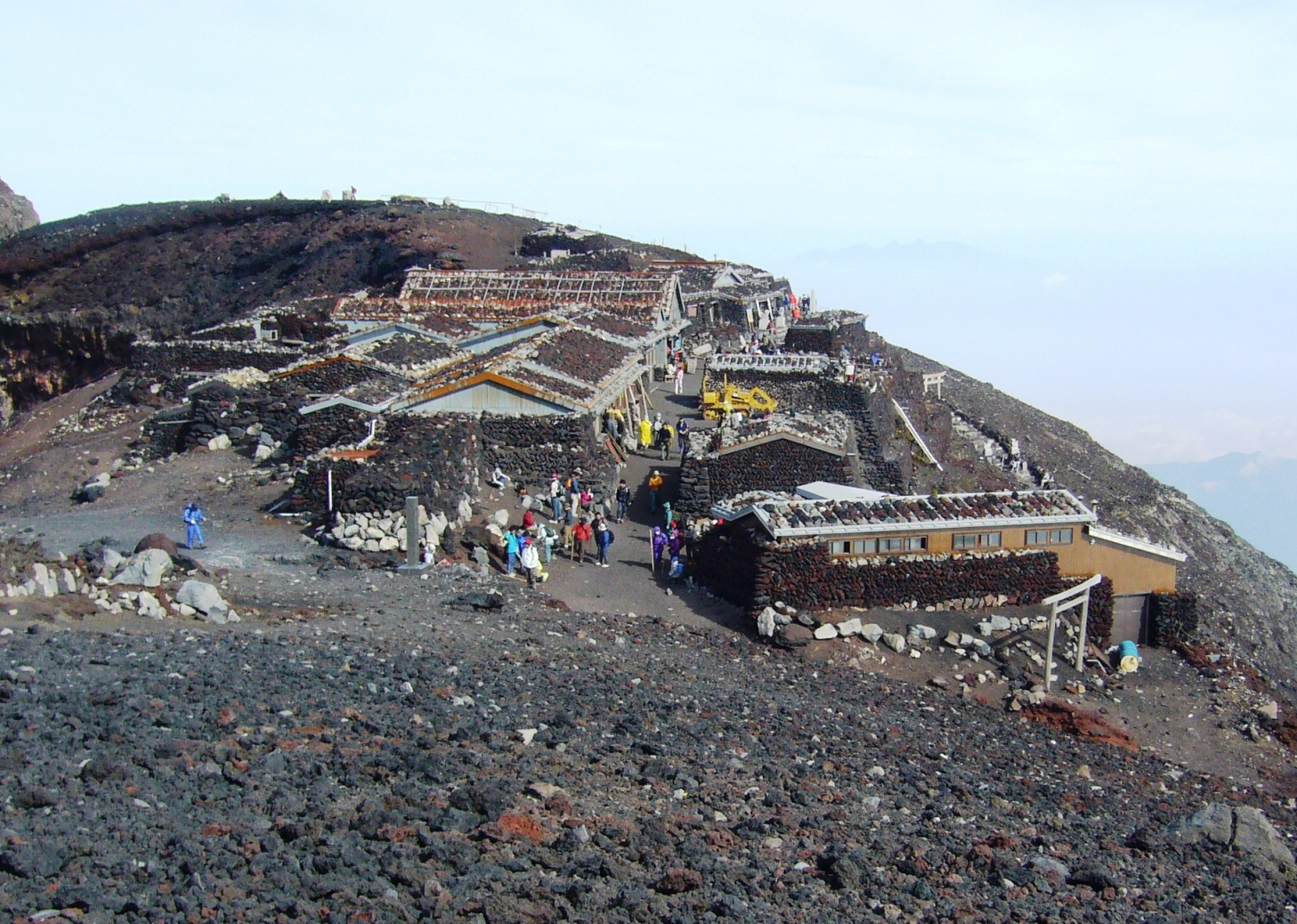 富士山吉田口（河口湖口・須走口）の頂上。4軒の山小屋や富士山本宮浅間大社東北奥宮などが立ち並び、山小屋銀座の様相を呈している。この付近の県境は未定扱いであるが、実際には静岡県小山町に属するものと考えられている。左の崖は噴火口。2007年8月27日に投稿者が撮影。